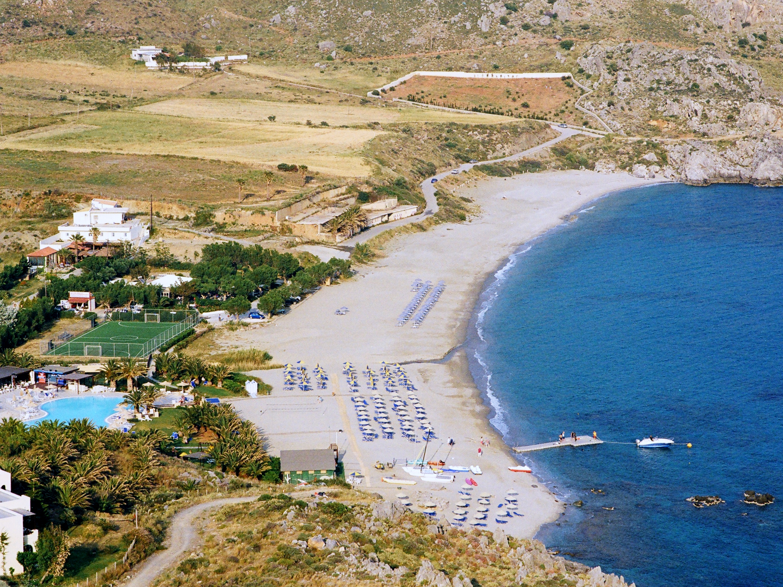 Strand von Damnoni bei Plakias, Kreta, Griechenland